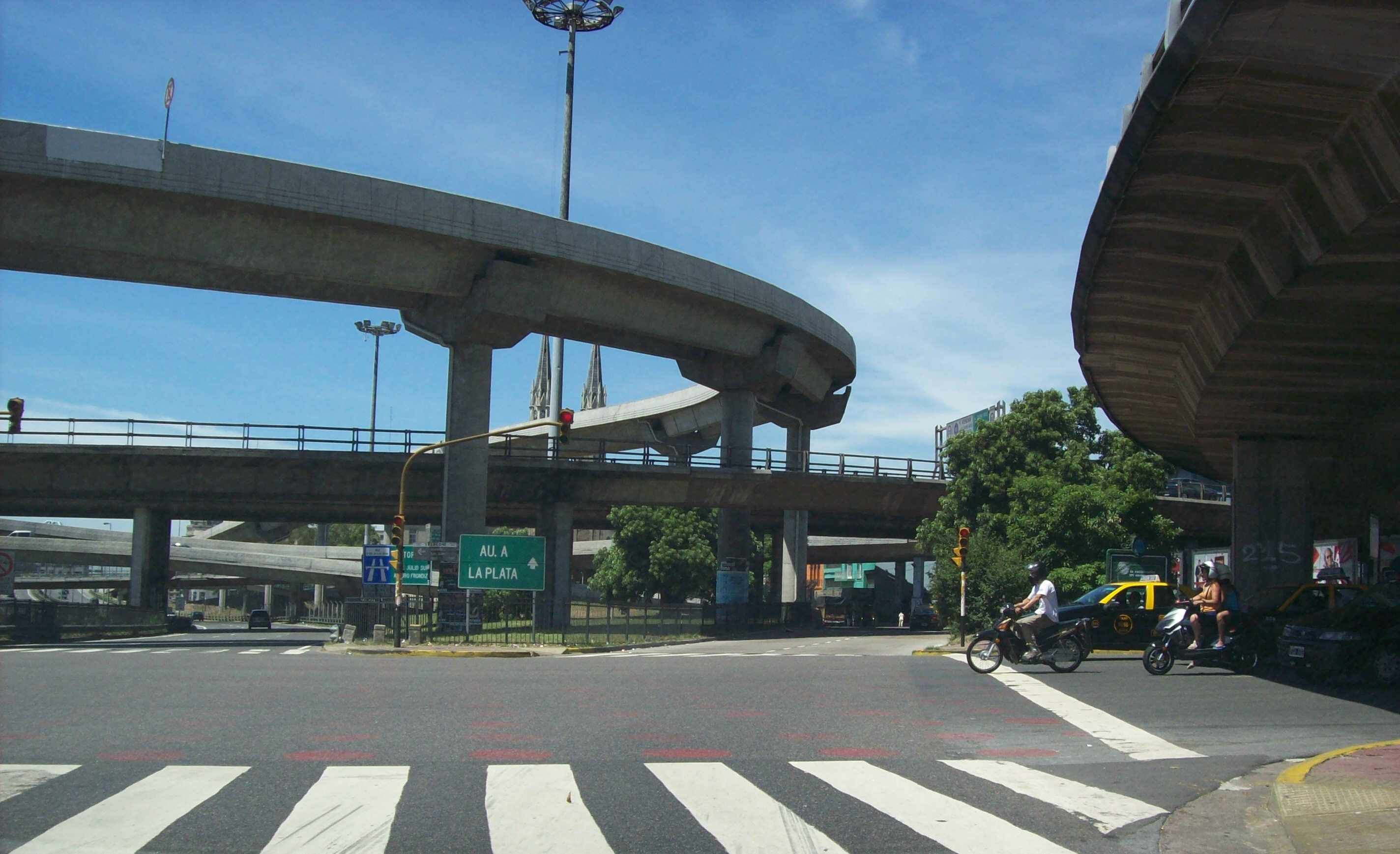 Cruce de la Avenida 9 de Julio con la Avenida San Juan en el barrio de Constitución, en Buenos Aires, Argentina. Se puede apreciar el intercambiador con la autopista 25 de Mayo.